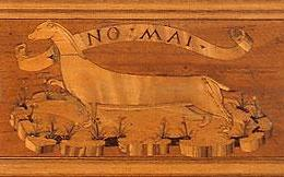 Stdiolo di guidobaldo da montefeltro